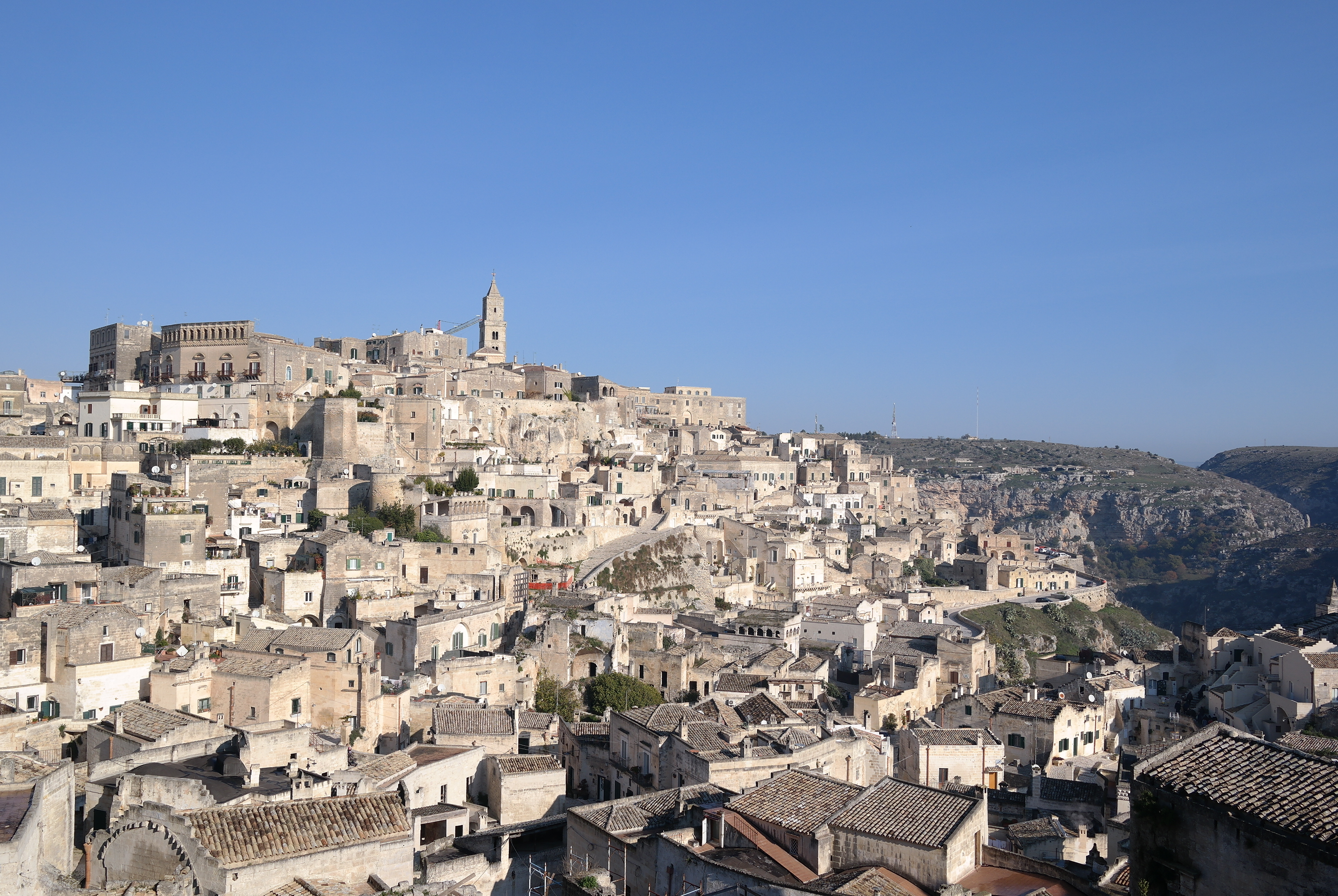 veduta della Civita da Palazzo Lanfranchi